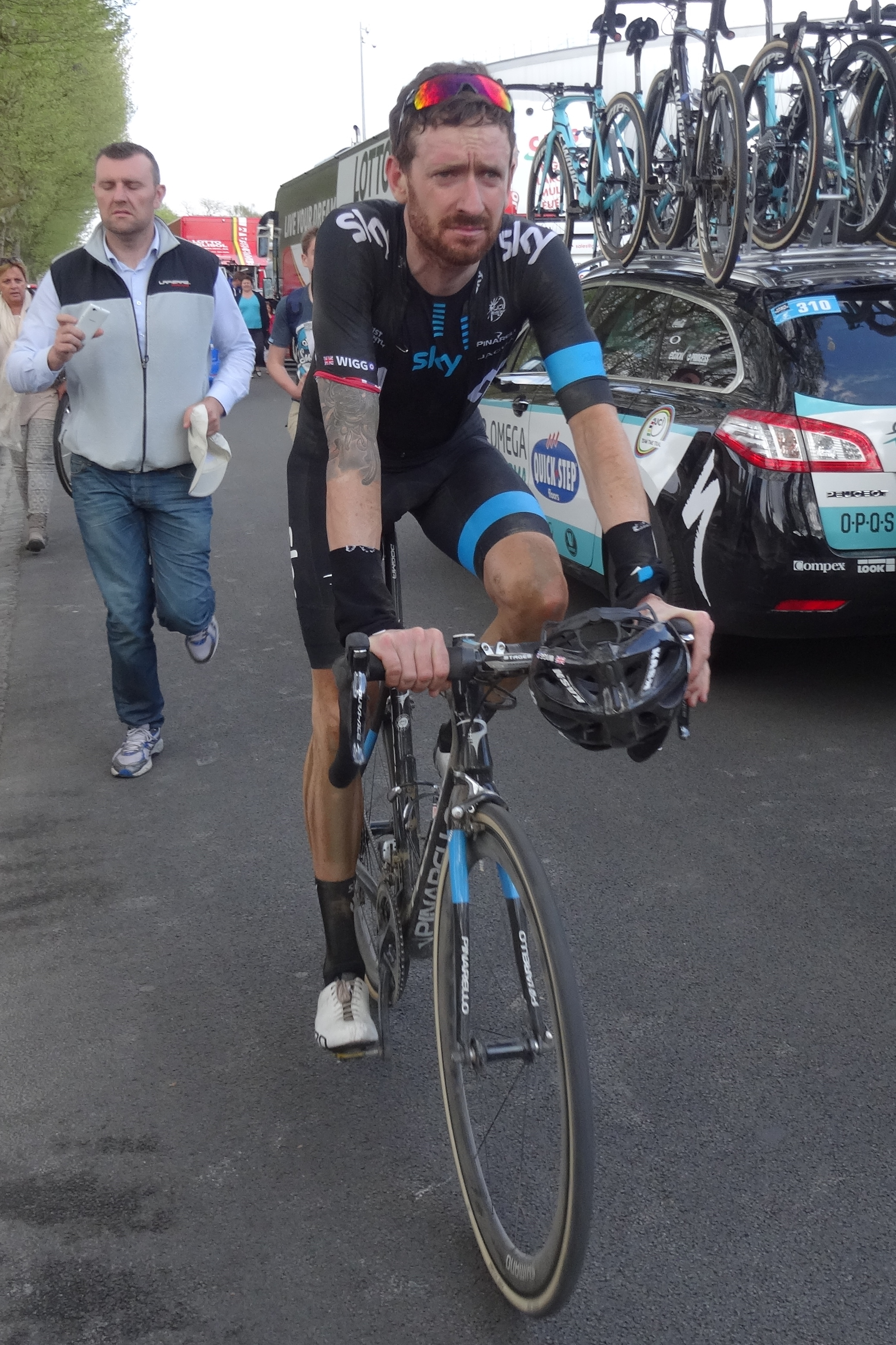 Retour des cyclistes à leurs bus après l'arrivée du Paris-Roubaix 2014 et pendant la remise des prix, le 13 avril 2014, à Roubaix, Nord, Nord-Pas-de-Calais, France. Depicted person: Bradley Wiggins